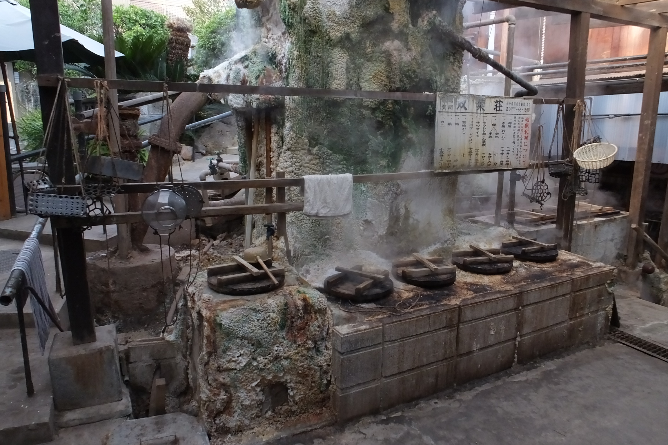 2020-02-24 Kannawa Onsen 鉄輪温泉双葉荘 地獄蒸し（源泉）